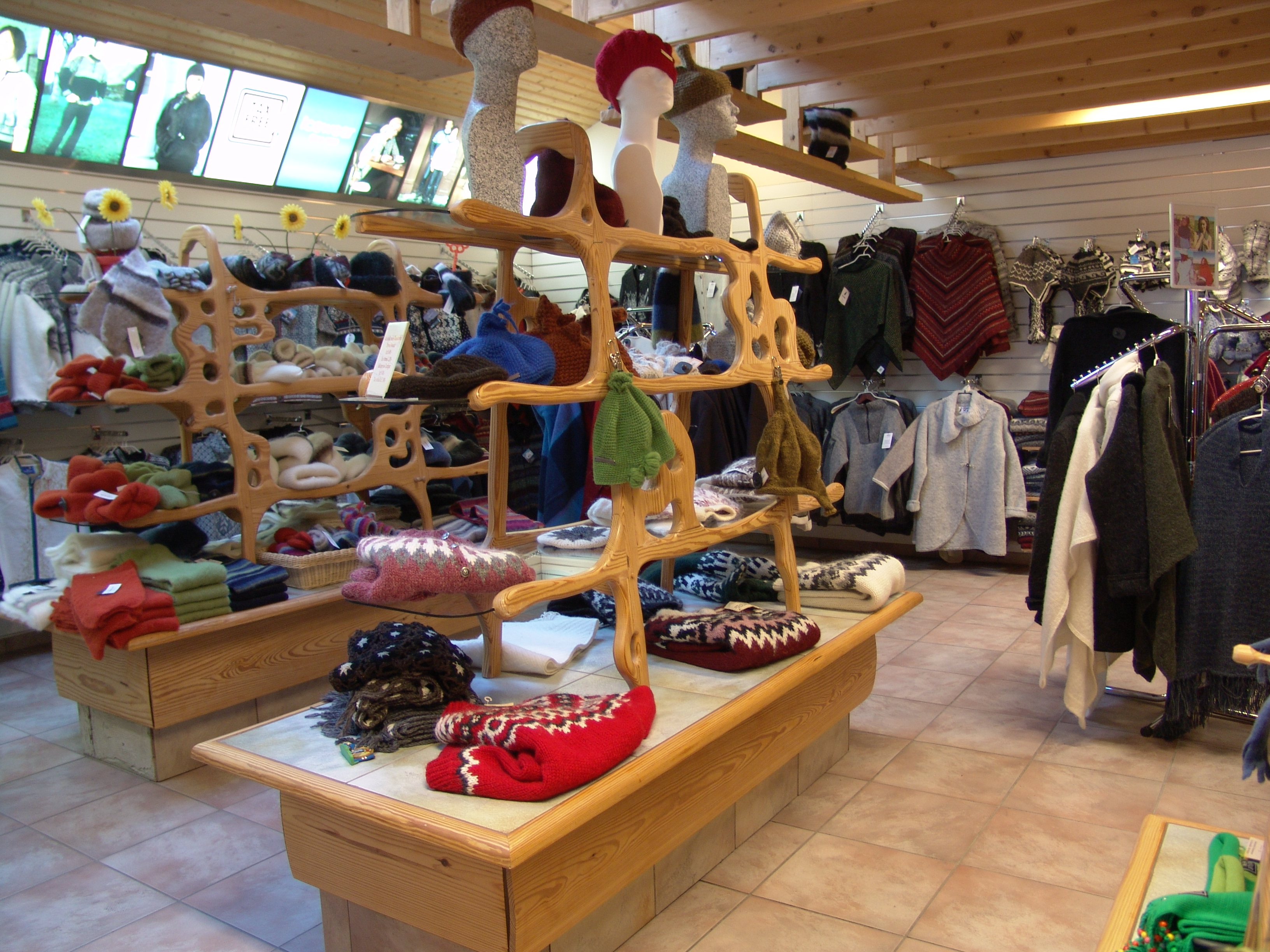 Geysir Souvenirladen.